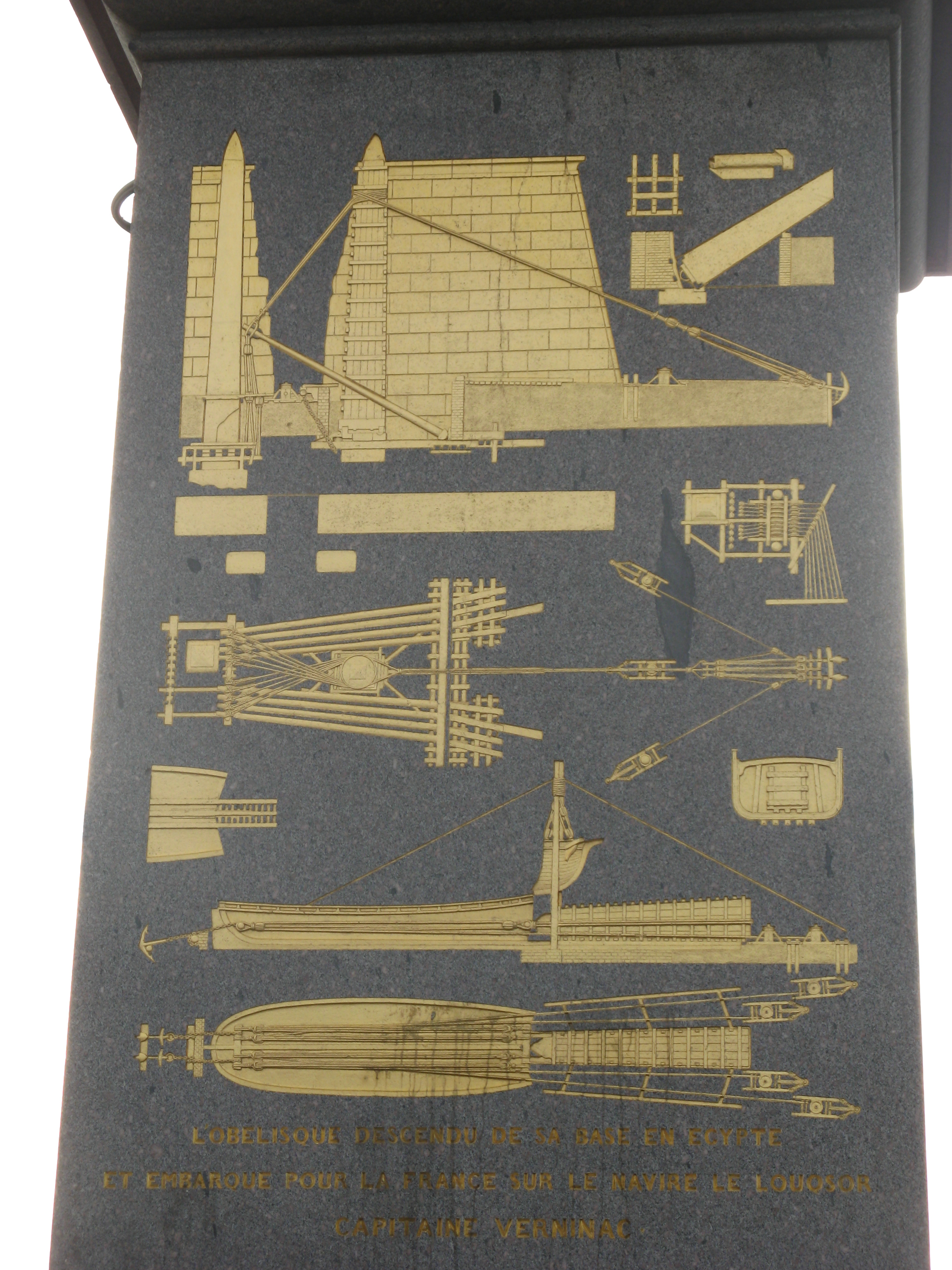 Obelisco de luxor en Paris.